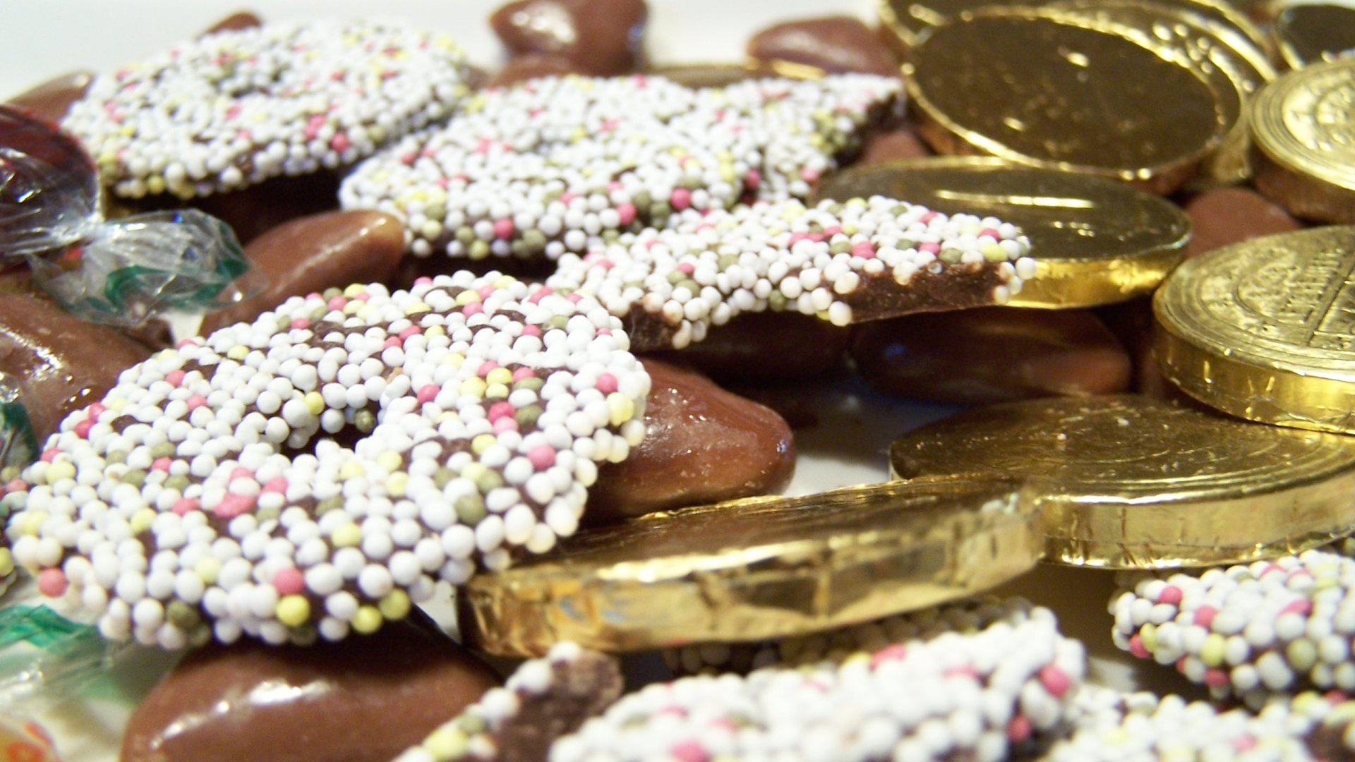 Makroaufnahme von Süßigkeiten